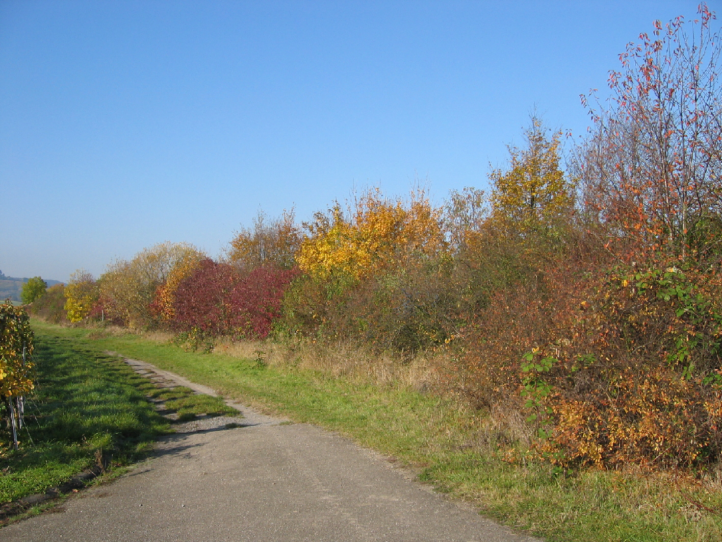 Benjeshecke im Herbst bei Öhringen-Michelbach am Wald